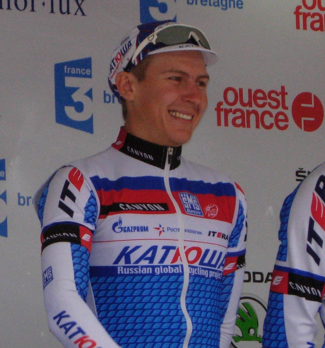 Tour de Bretagne 2013 - Présentation des équipes au départ de la deuxième étape à Ploemel - Équipe Itera-Katusha Depicted person: Igor Frolov